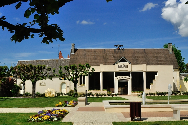 Mairie d'Ambrault (Indre)